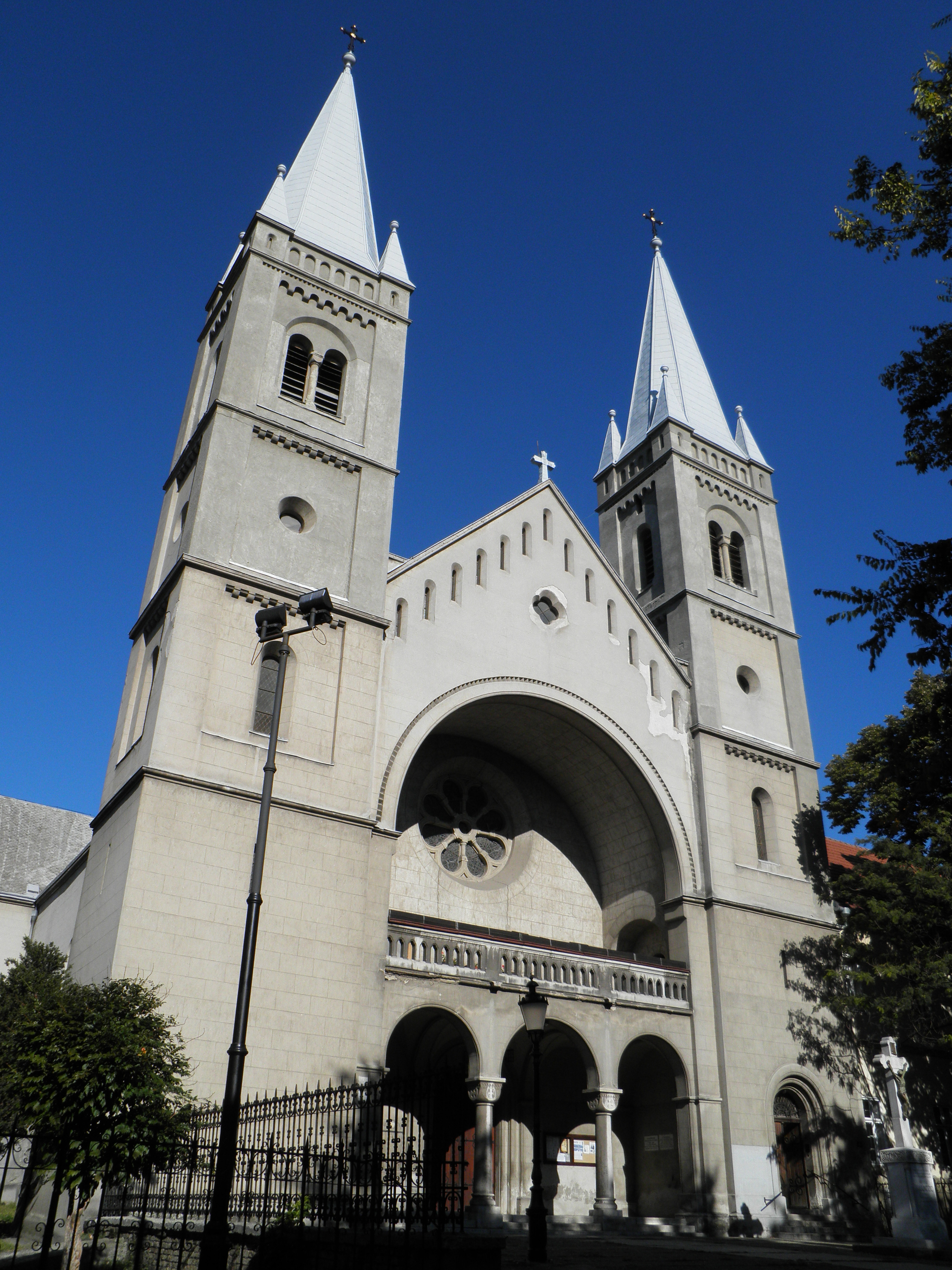 Franjevačka crkva